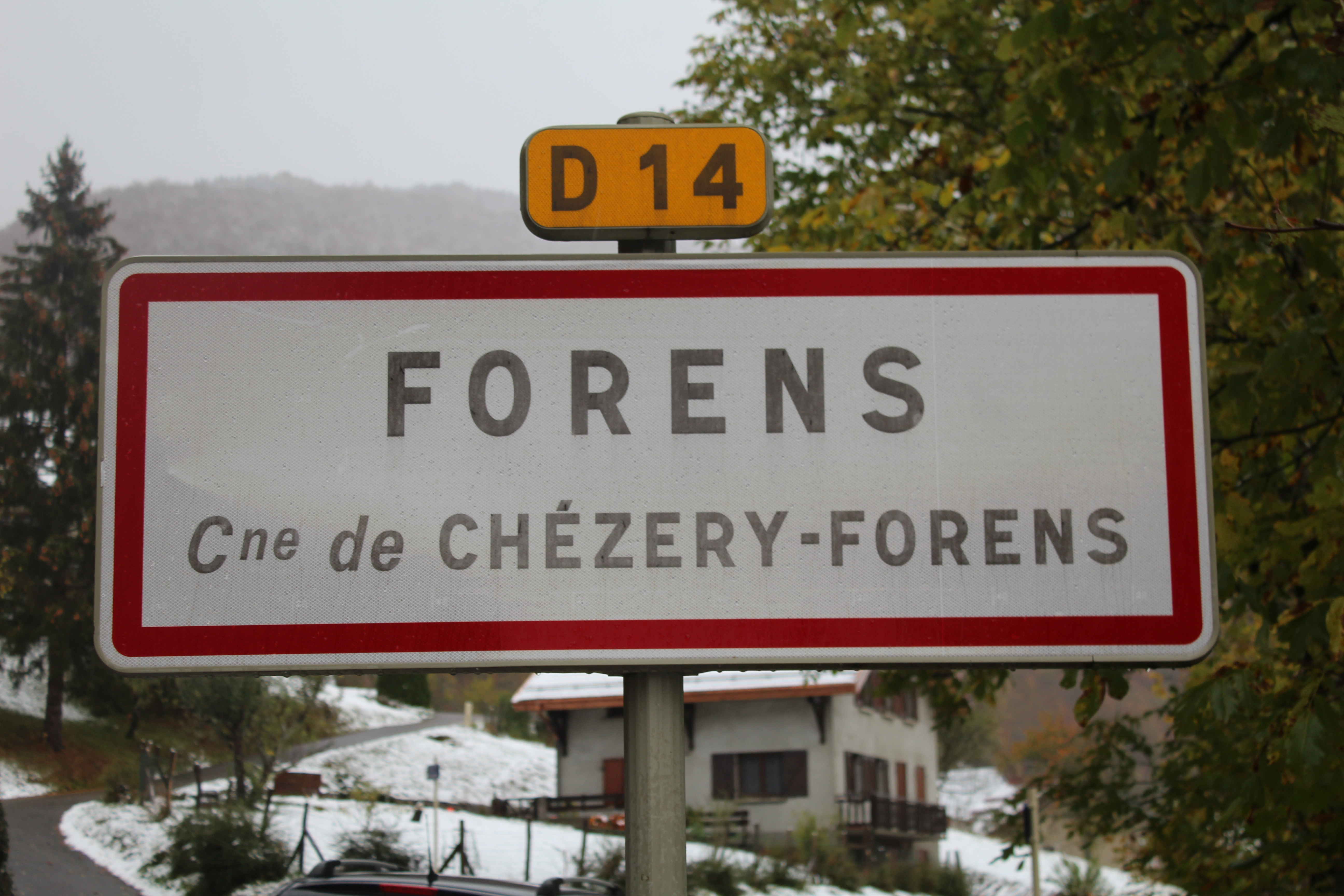 Panneau d'entrée dans Forens, Chézery-Forens.